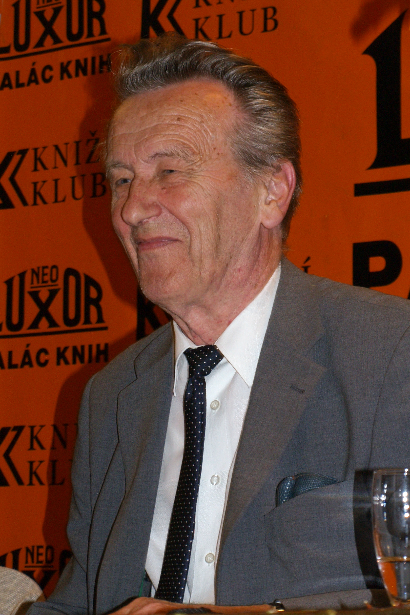 Český profesor lesnictví Erich Václav (1930–2018) během autogramiády v Neoluxoru, 2009